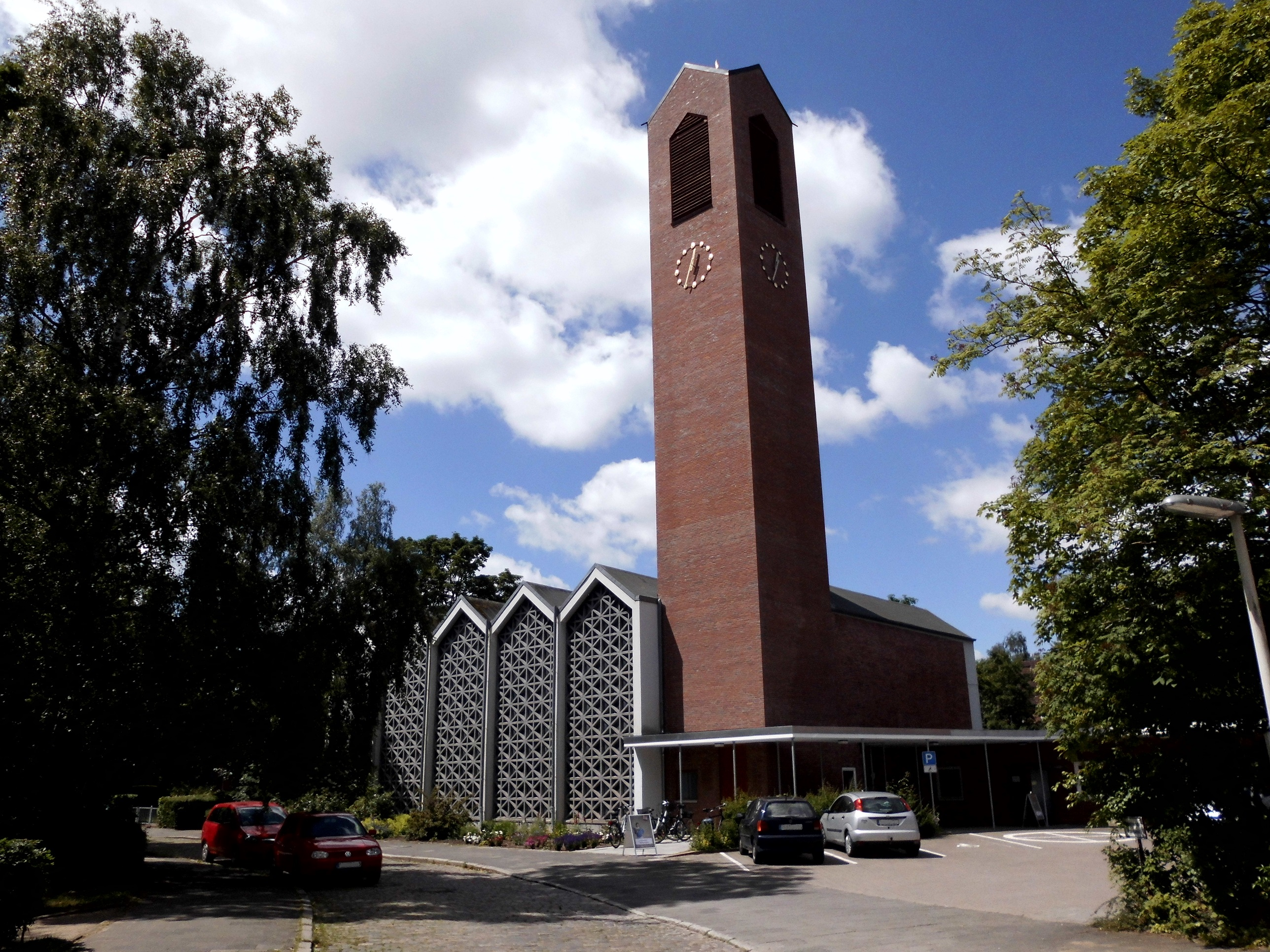 Die Paul-Gerhardt-Kirche im Kieler Stadtteil Neumühlen-Dietrichsdorf. Der frühere Glockenturm musste 2013 abgerissen werden; er wurde in der alten Bauform vollständig neu errichtet.